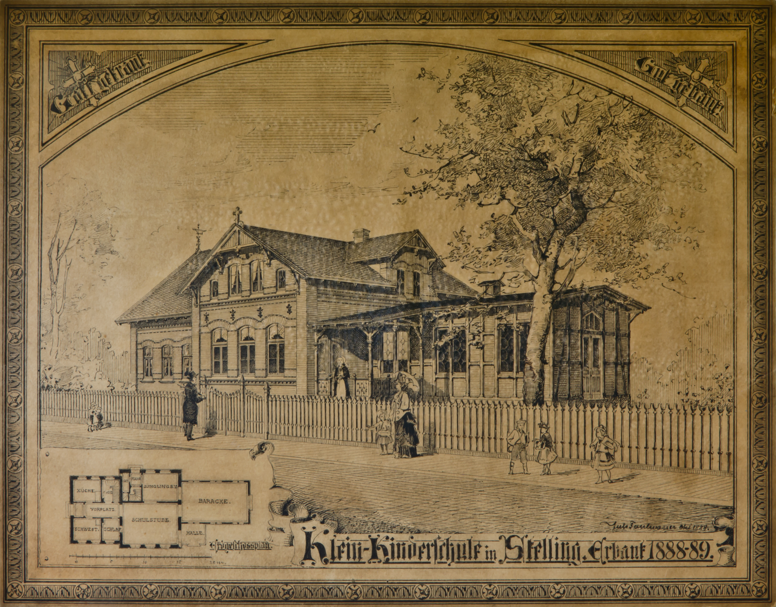 Foto einer Grafik, aufgehängt in der Kita Jugendstr. Hamburg Stellingen, lt einer der Mitarbeiterinnen stand die abgebildete Kleinkinderschule früher auf dem Gelände der jetzigen Kindertagesstätte, historische Adresse lt. Hand- und Adressbuch des Kreises Pinneberg, 1903 (Seite 497) möglicherweise Kleinkinderschule, Schulstraße 19, Stellingen-Langenfelde , Architekt: Carl Julius Faulwasser * 17. Januar 1855 in Hamburg † 8. Dezember 1944 in Breslau/Schlesien bestattet in Hamburg, Friedhof Ohlsdorf